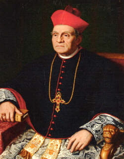 Michelangelo Celesia (1814-1904), cardinal